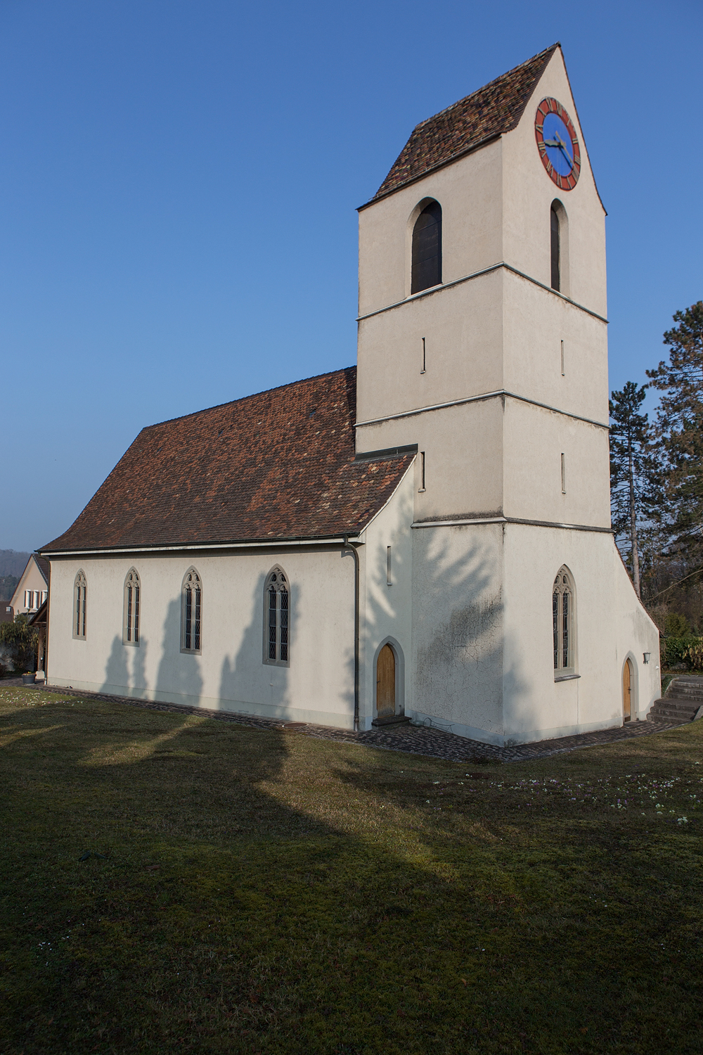 Reformierte Kirche in Münchenstein (BL)